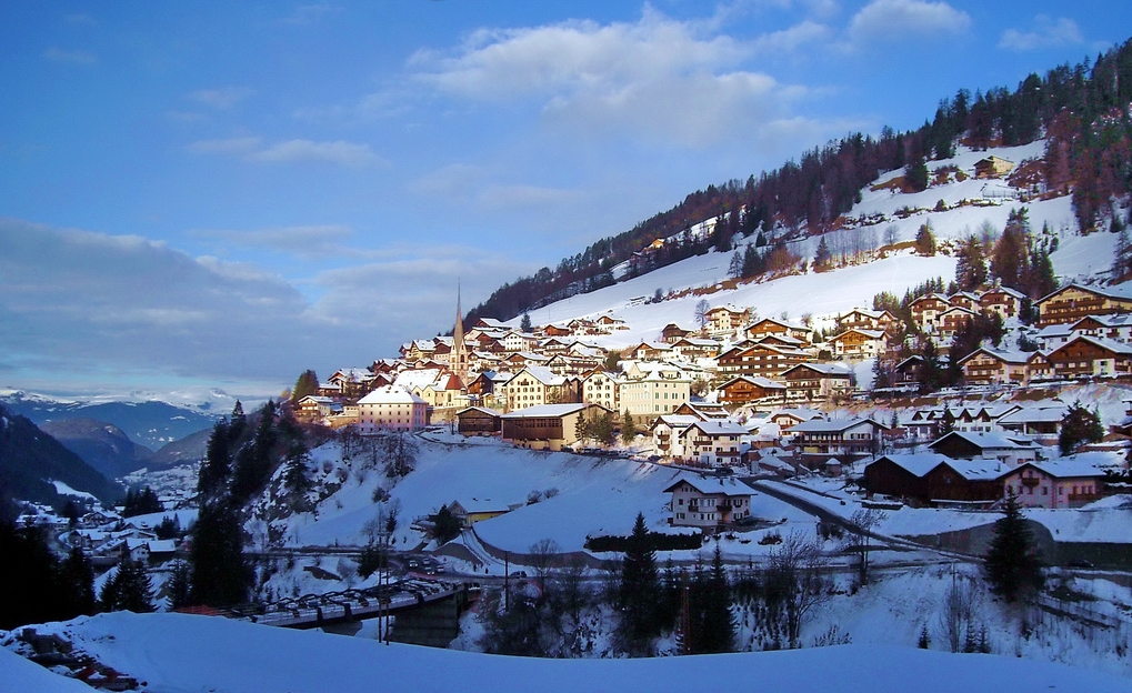 Panorama perfekt